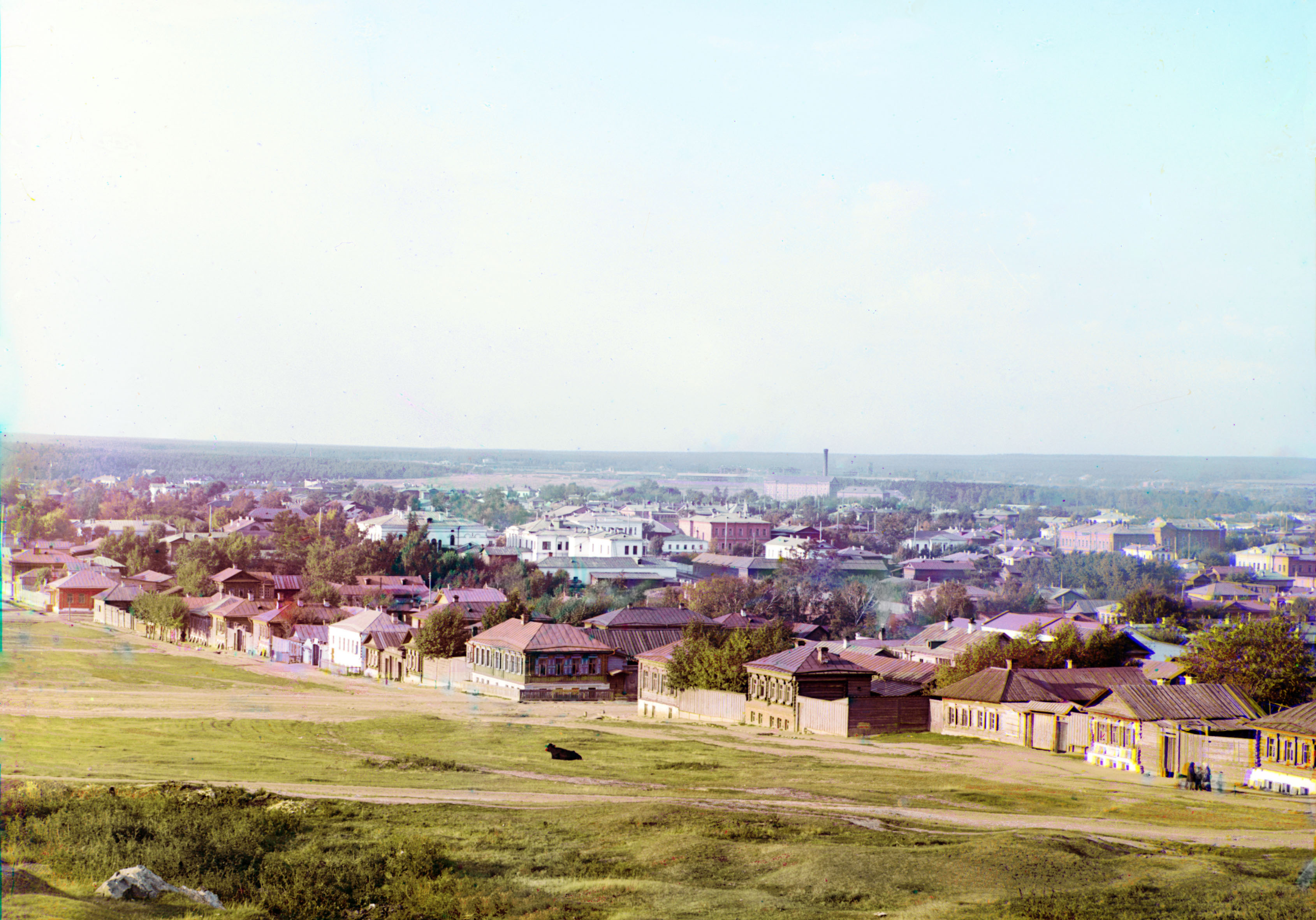 Панорама северной части Екатеринбурга со стороны ул. Московской.